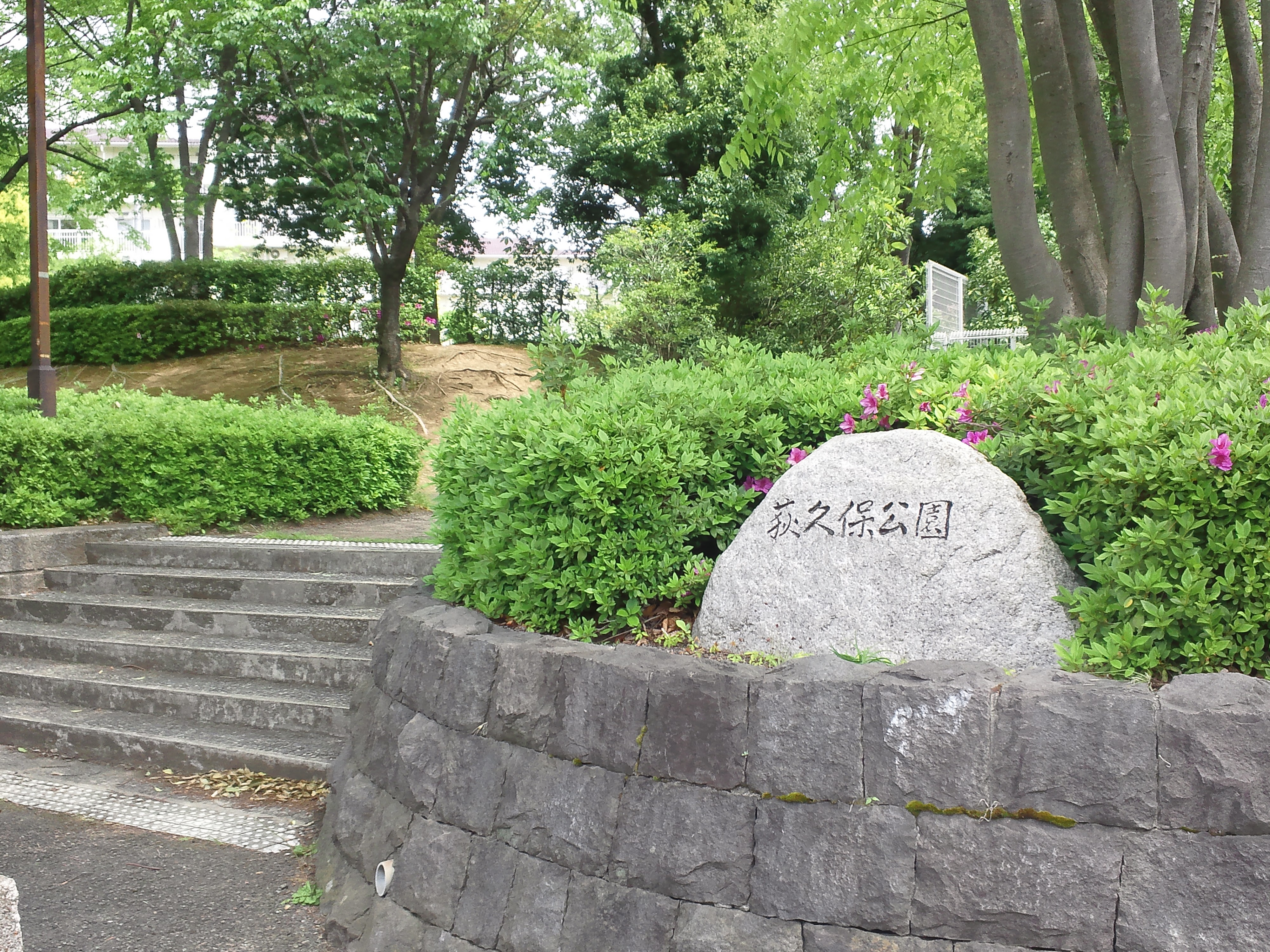 荻久保公園（旧小野路町）